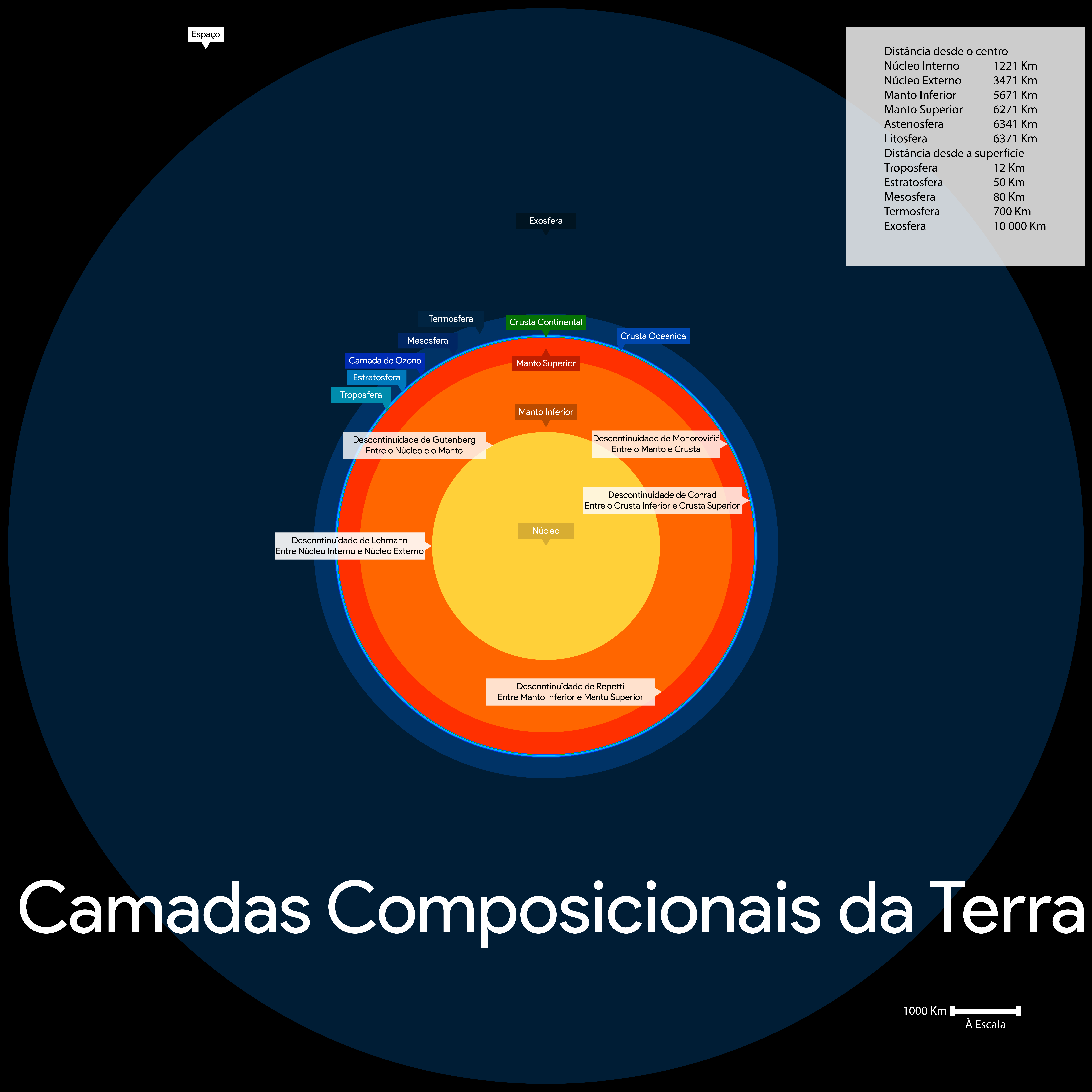 Camadas Composicionais da Terra à escala e os seus tamanhos